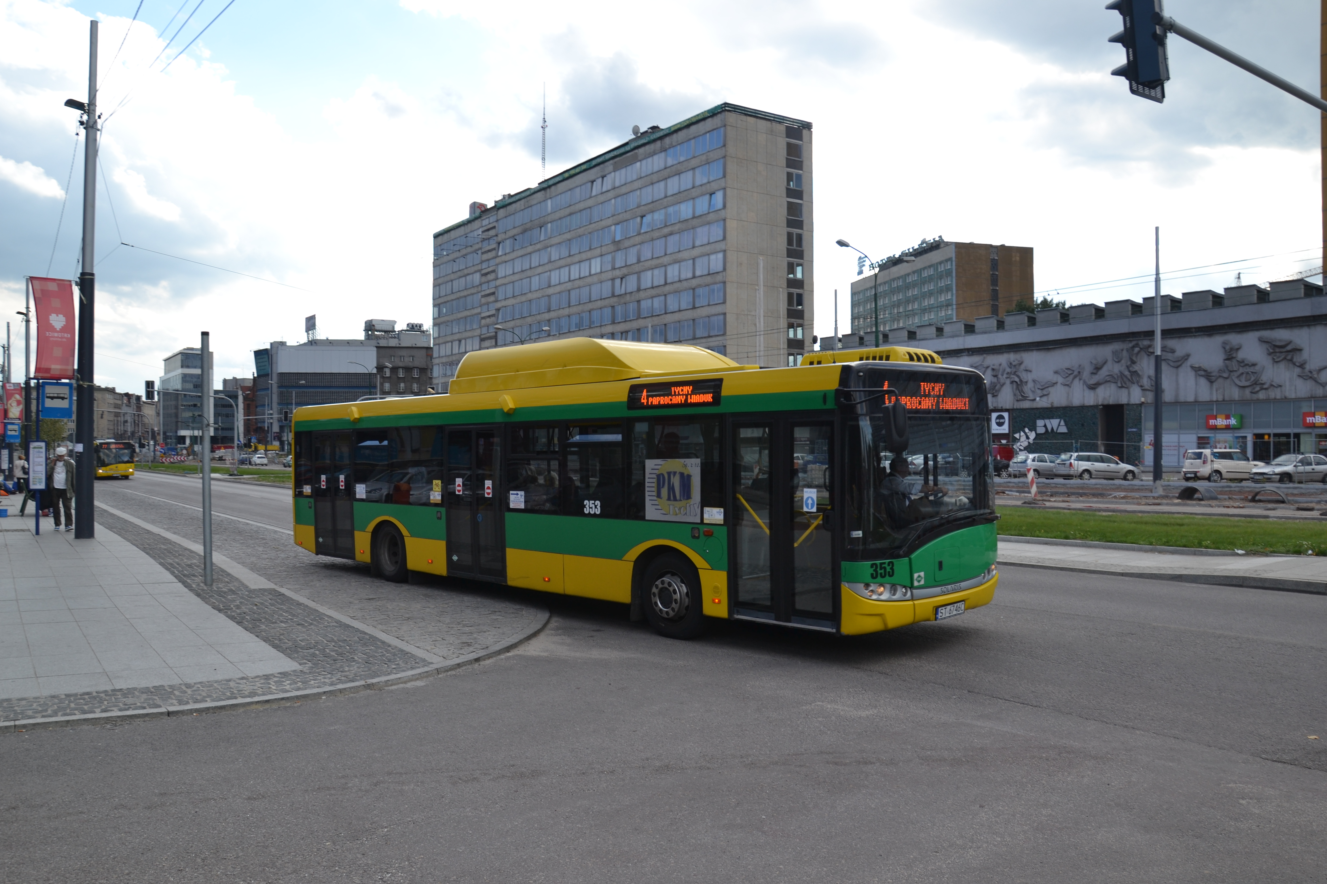 Solaris Urbino 12 CNG odjeżdża z przystanku w Katowicach